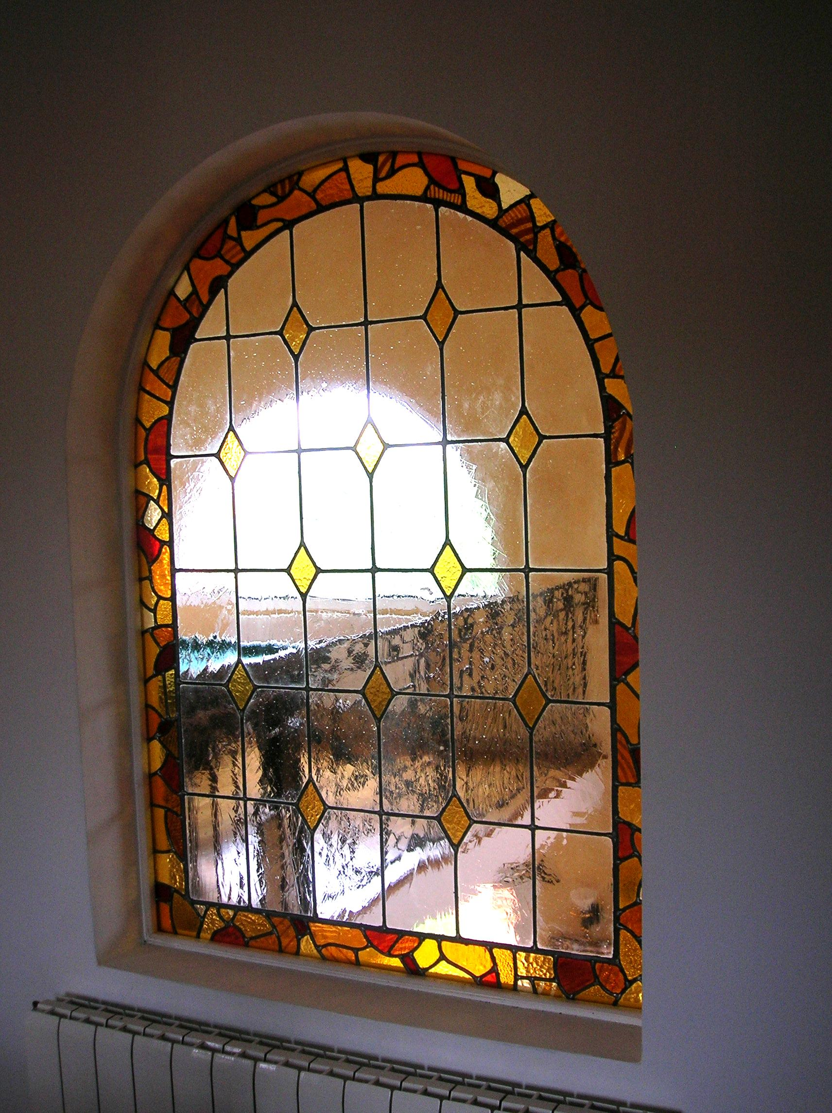 Préciser le lieu